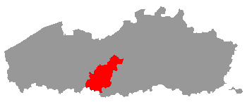 Locatie van Denderstreek in Vlaanderen